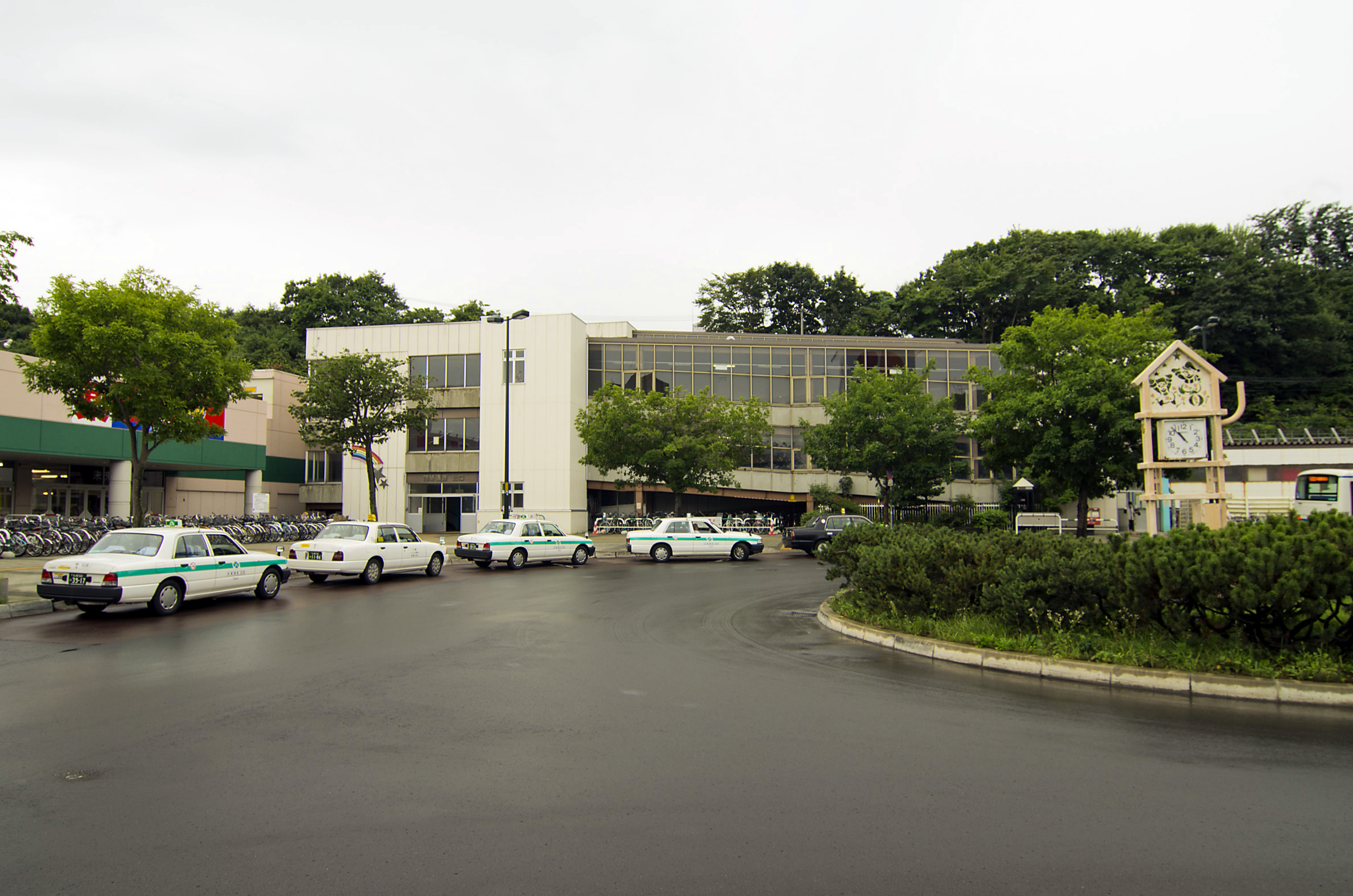 北海道旅客鉄道株式会社函館本線星置駅北口